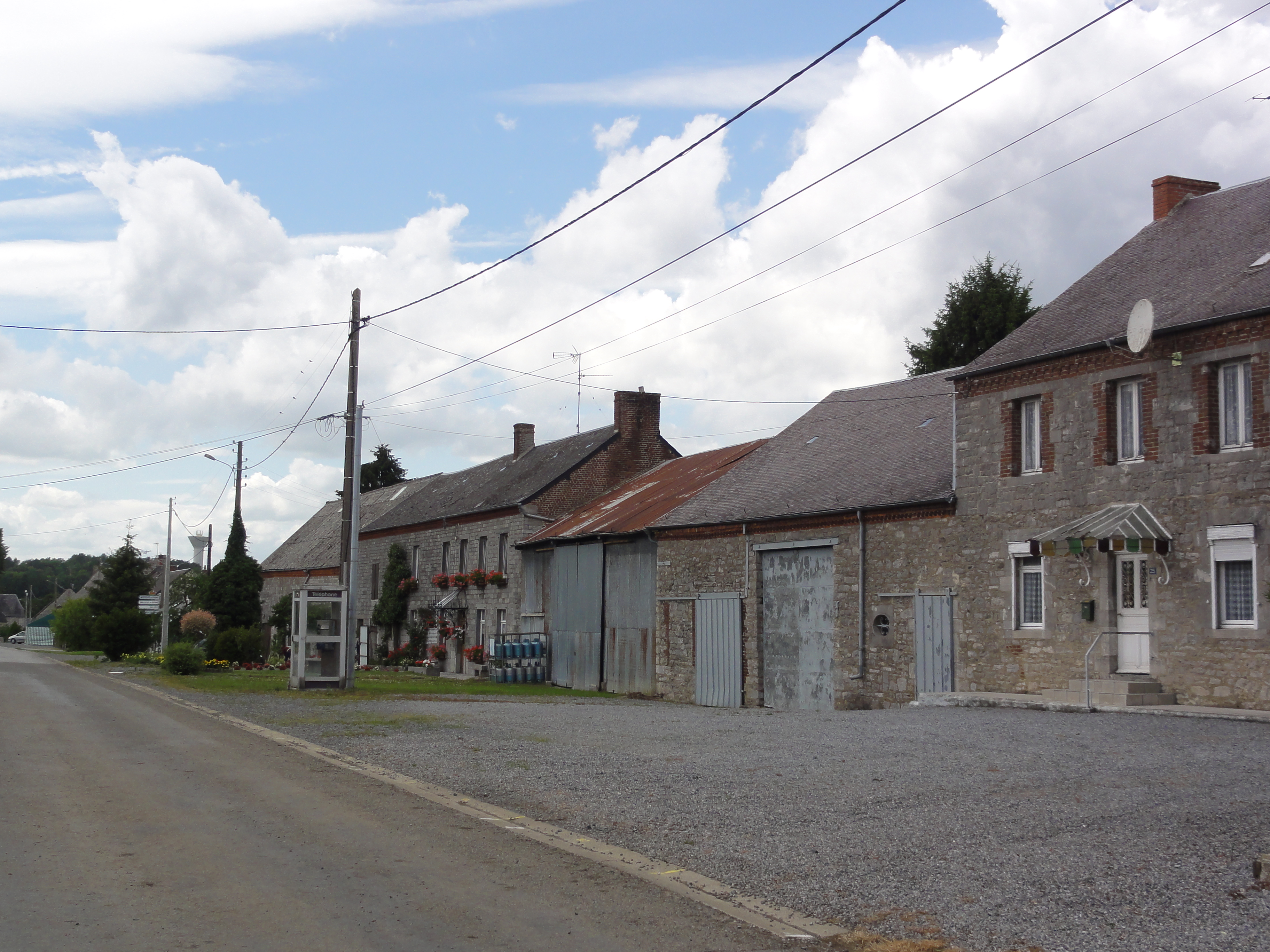 Baives (Nord, Fr) la Rue Principale. 45 fermes à Baives sont répérées, dont 11 sont inscrites. . La ferme à gauche sur la photo, Rue Principale nr 23, est inscrite. .